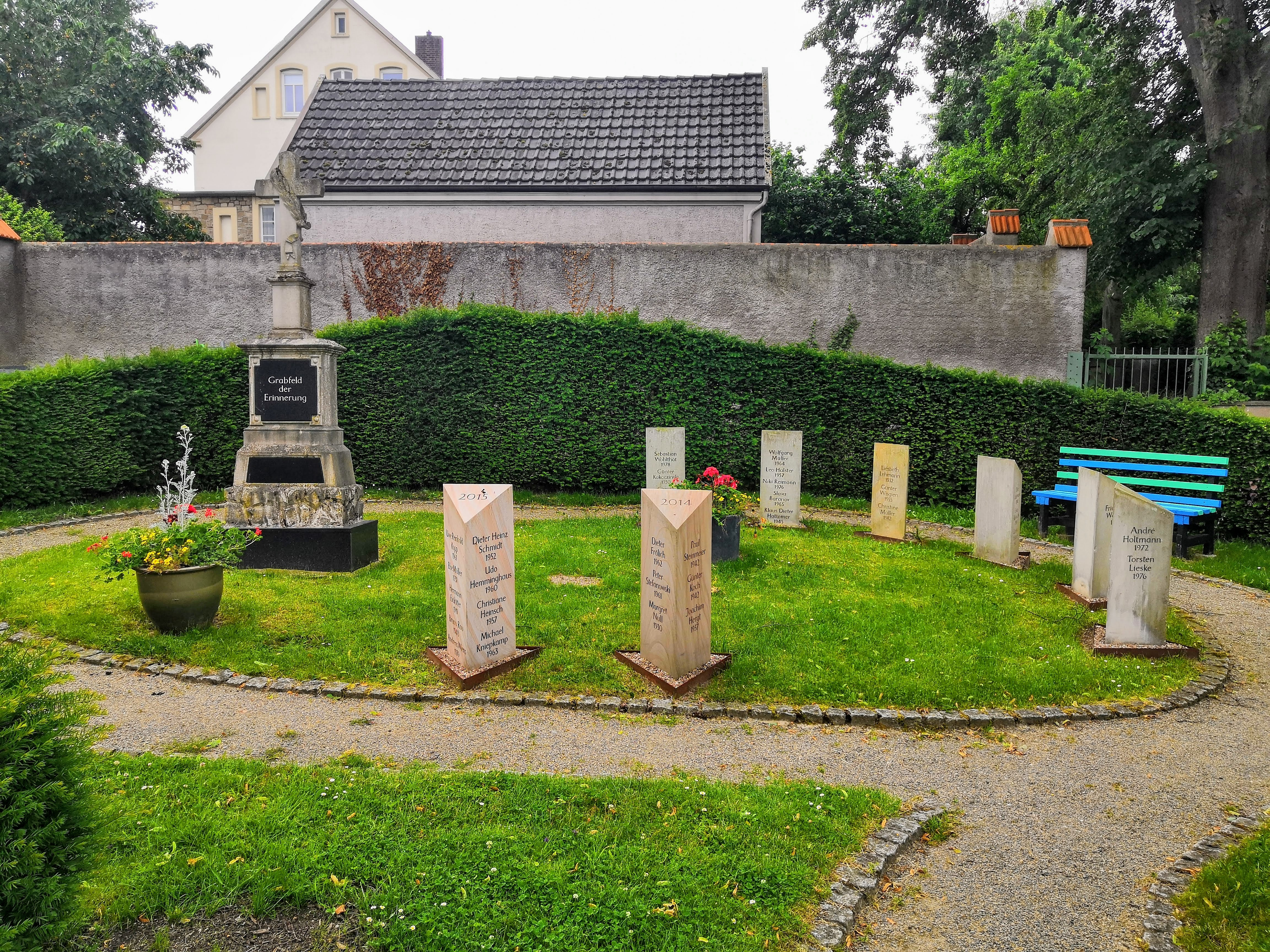 Seit November 2008 gibt es in Herford, initiiert durch den Herforder Mittagstisch e. V., das Grabfeld der Erinnerung. Ein Ort, an dem mittellose Menschen nicht mehr anonym beigesetzt werden.